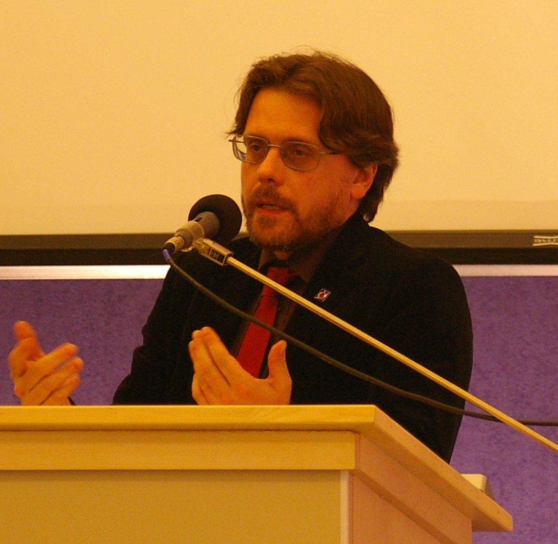 Emil Páleš na České konferenci v Poděbradech (výřez)